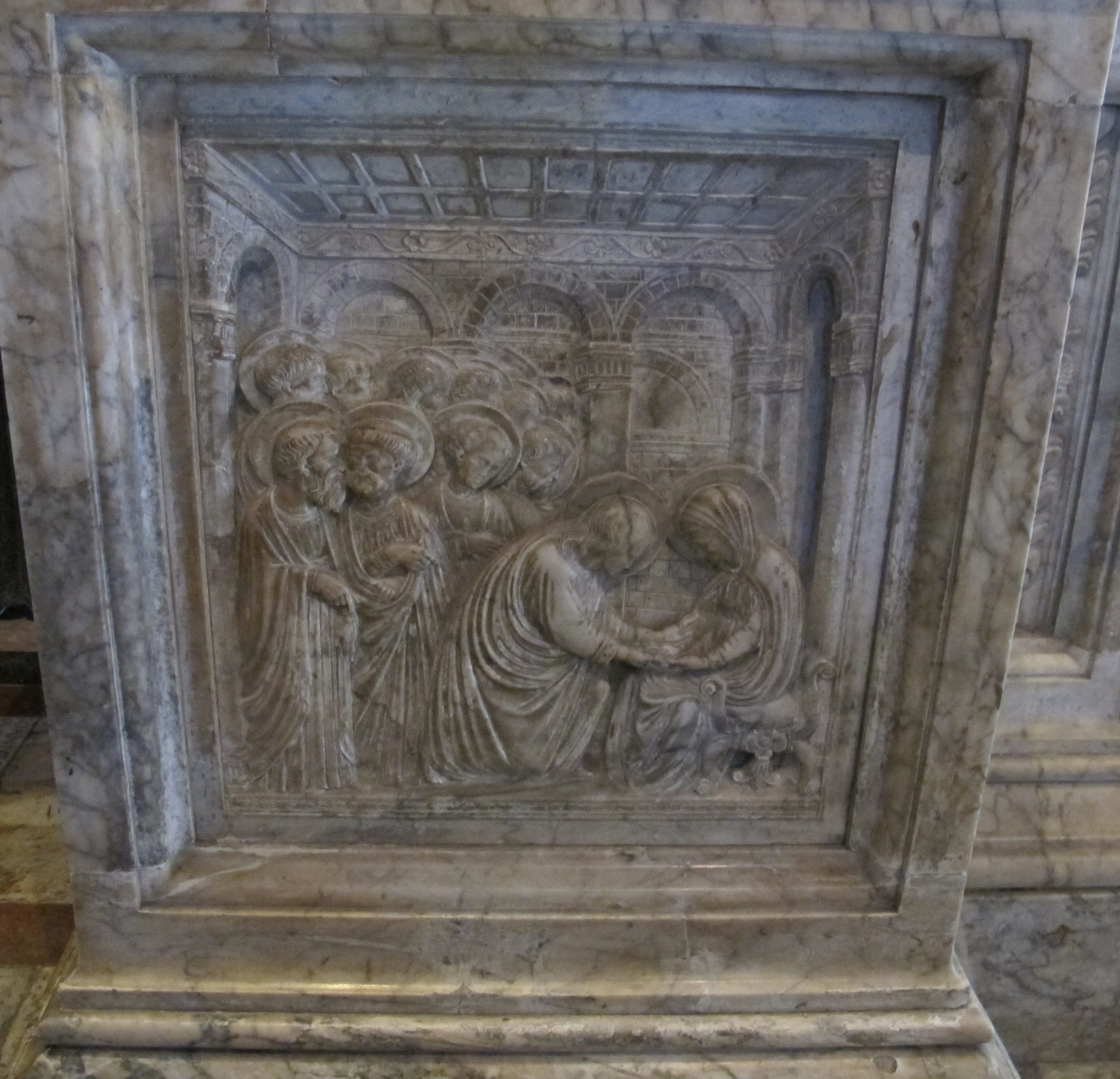 Portale centrale della controfacciata, urbano da cortona, storie della verrgine